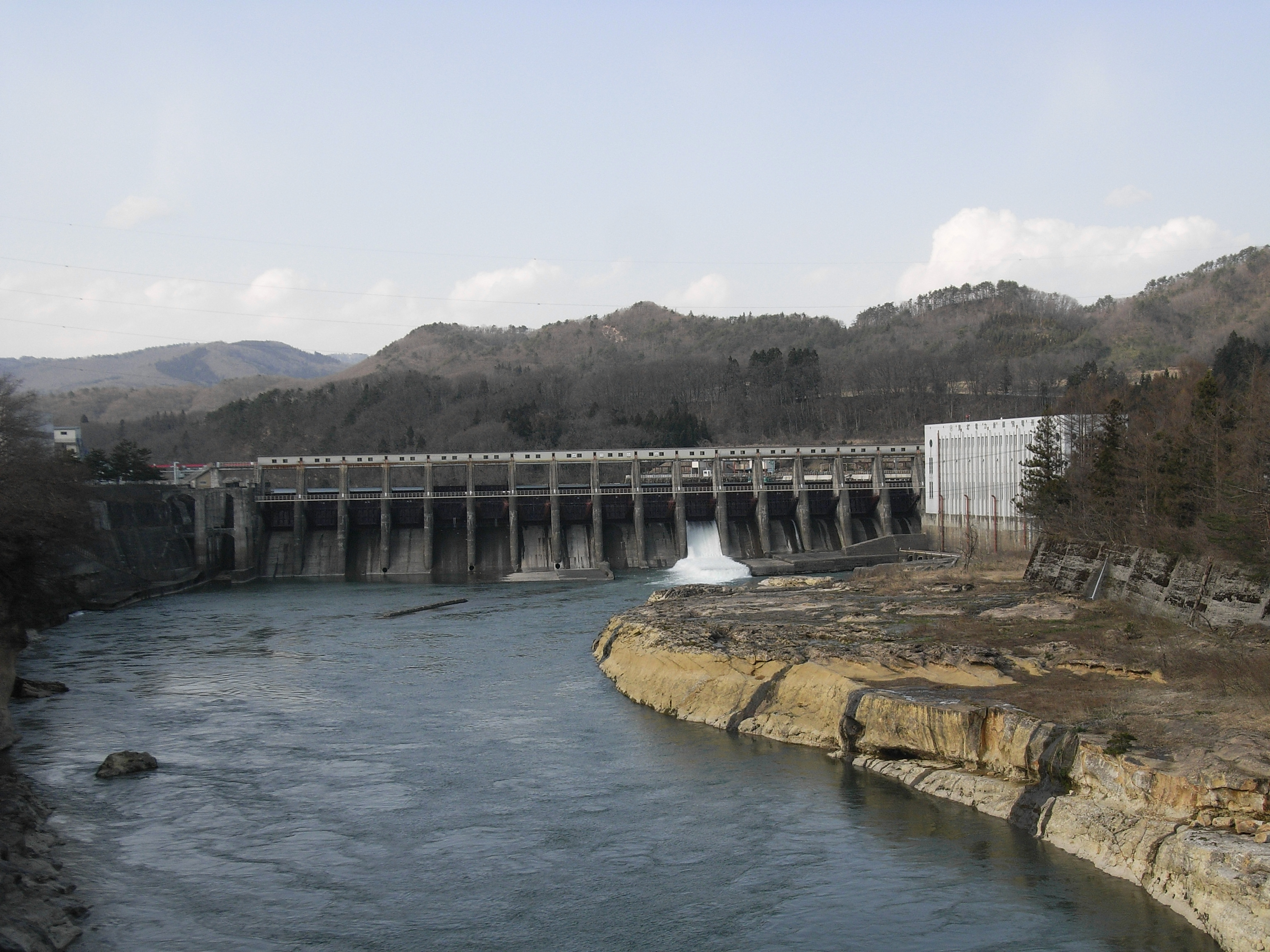 Dam